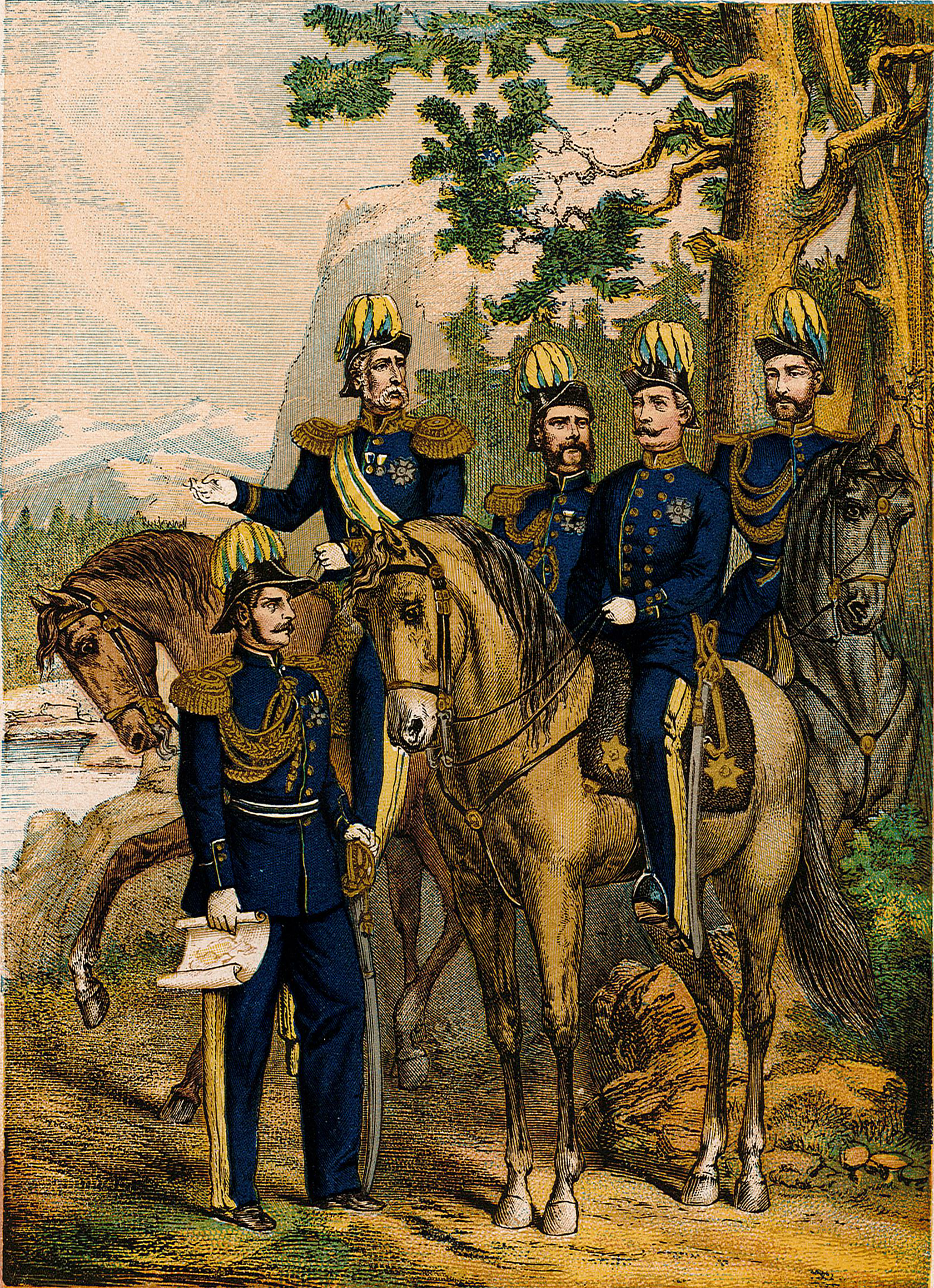 Uniformer för ”Generalitetet, Staben, Topografiska Corpsen och Artilleri-Staben.”